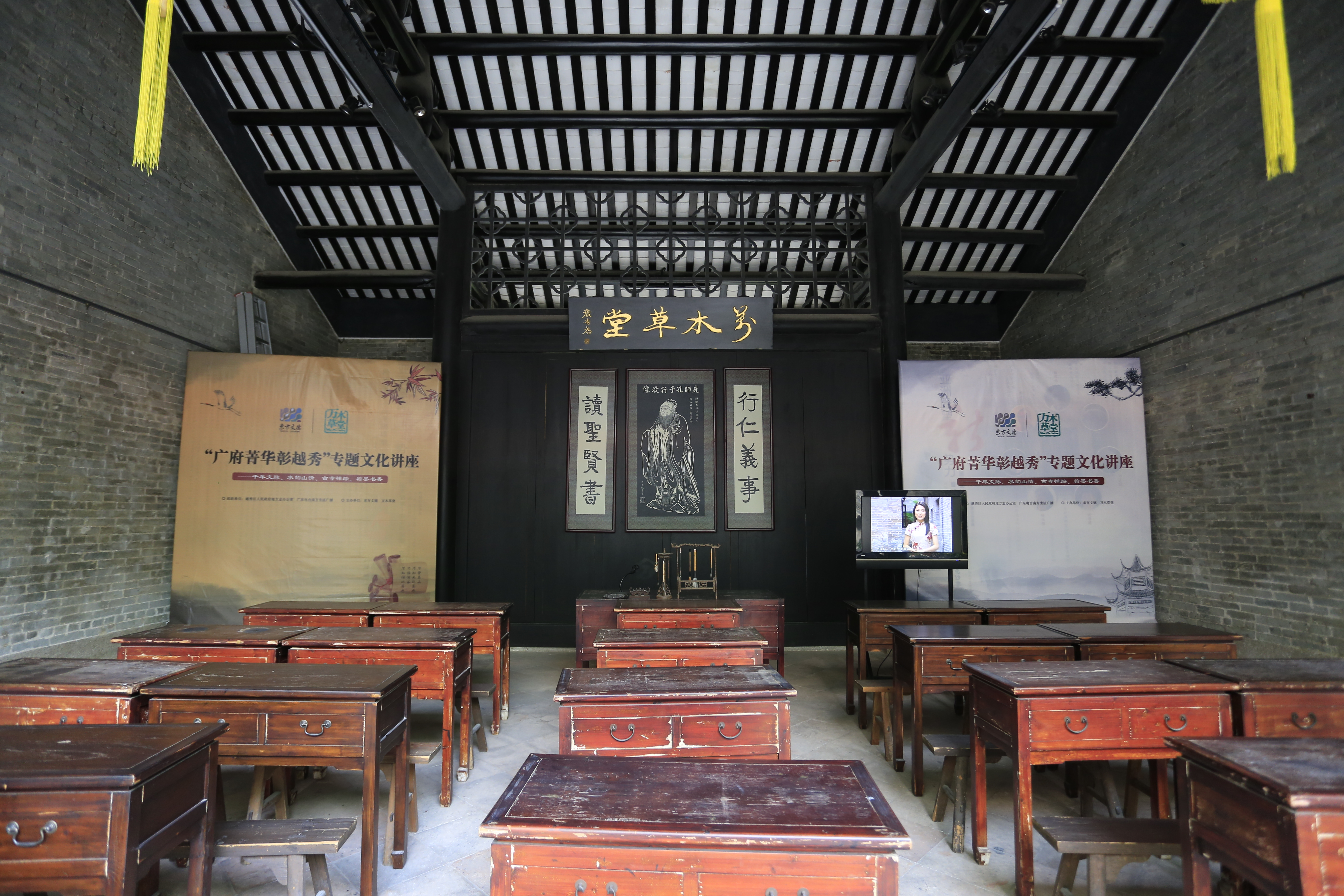 广州万木草堂